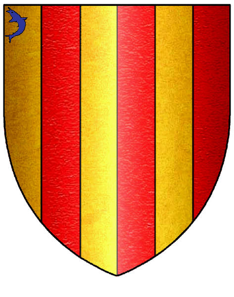 Blason famille d'Amboise de Bussy